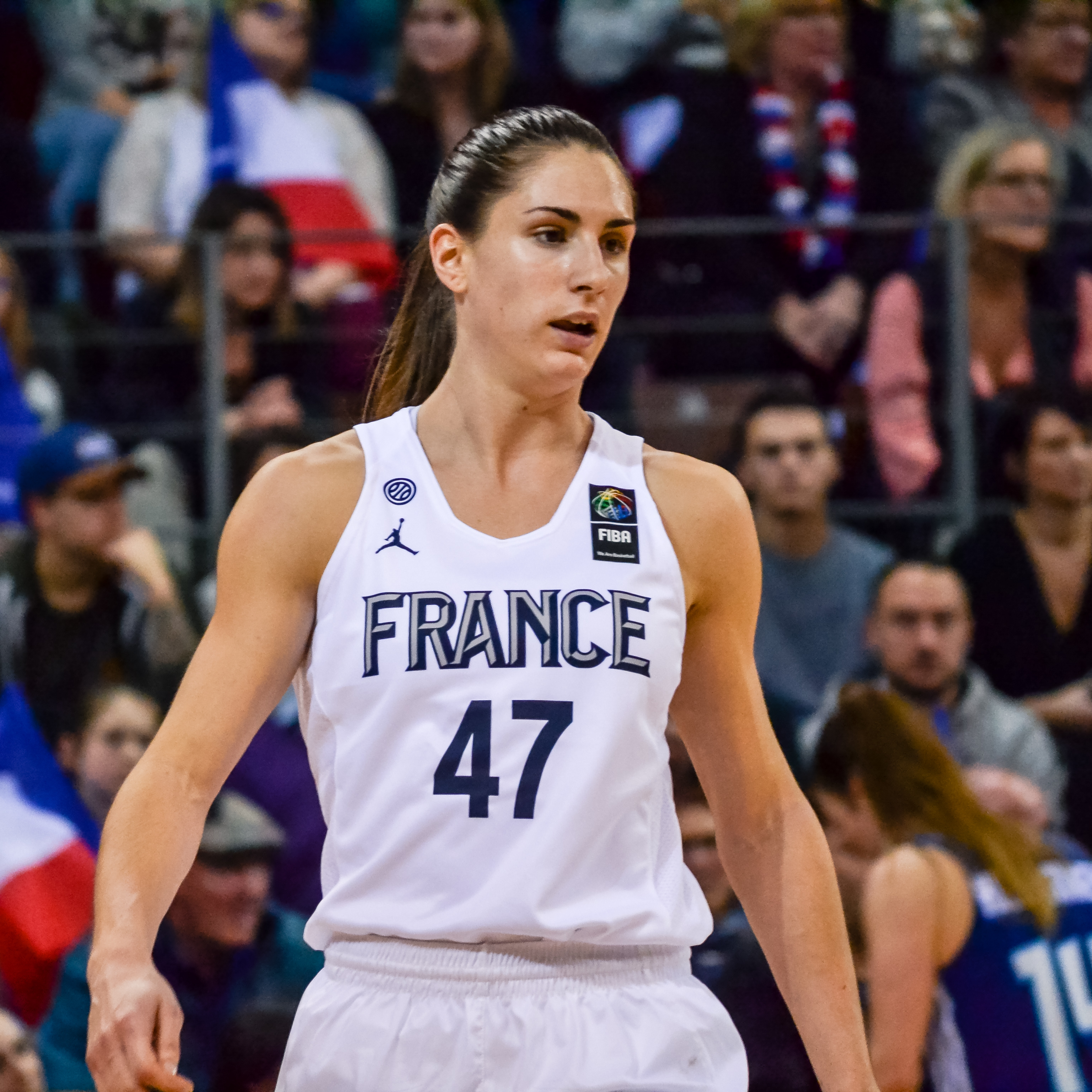 Rencontre de l'Equipe de France féminine de basket-ball contre la Finlande (90-40), comptant pour les qualifications à l'Euro 2019, le 14 février 2018 à Brest. C'était la première fois que la Brest Arena, d'une capacité de 5 000 spectateurs, accueillait un match international de basket.